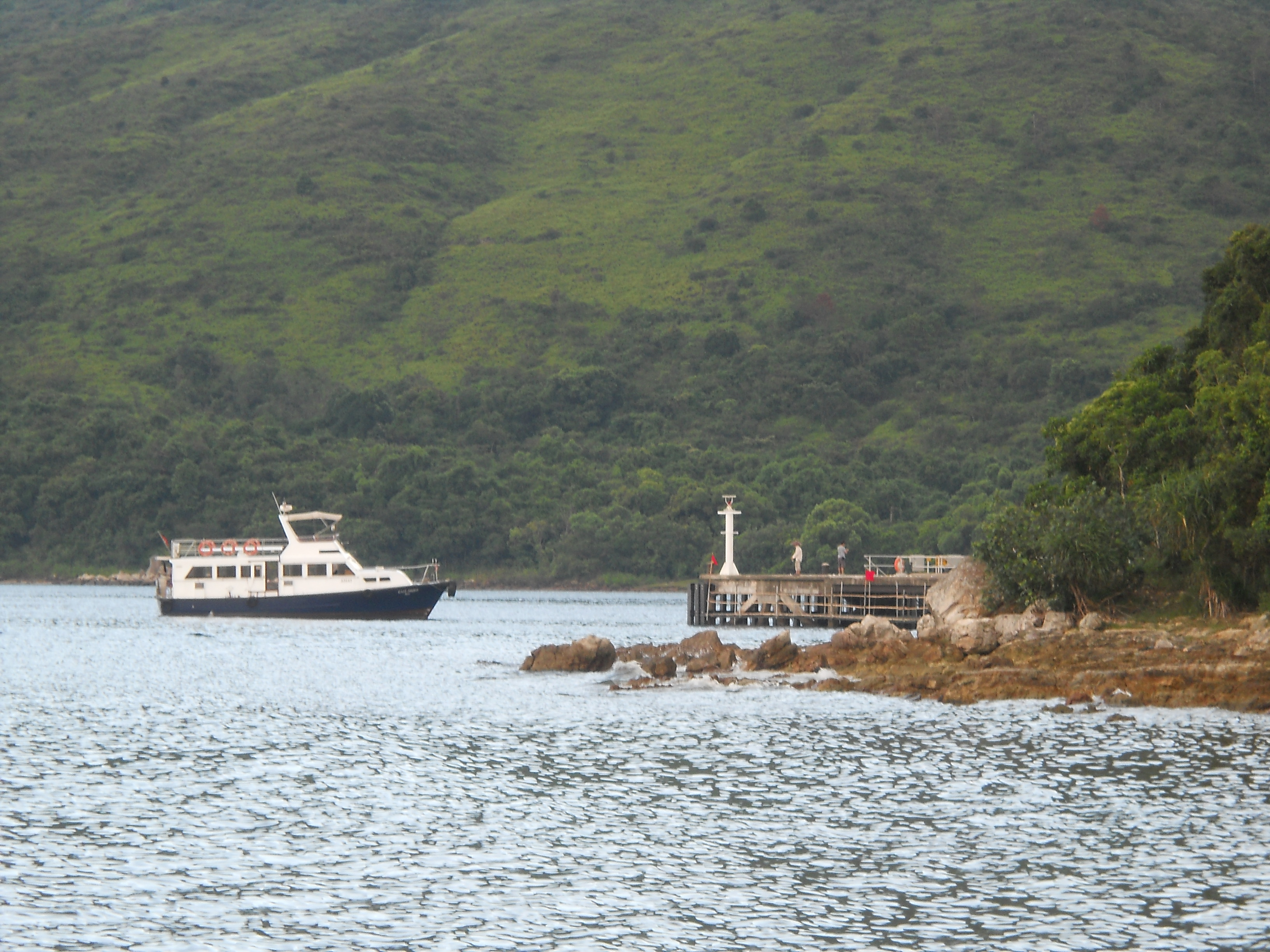 翠華船務街渡抵達荔枝莊碼頭